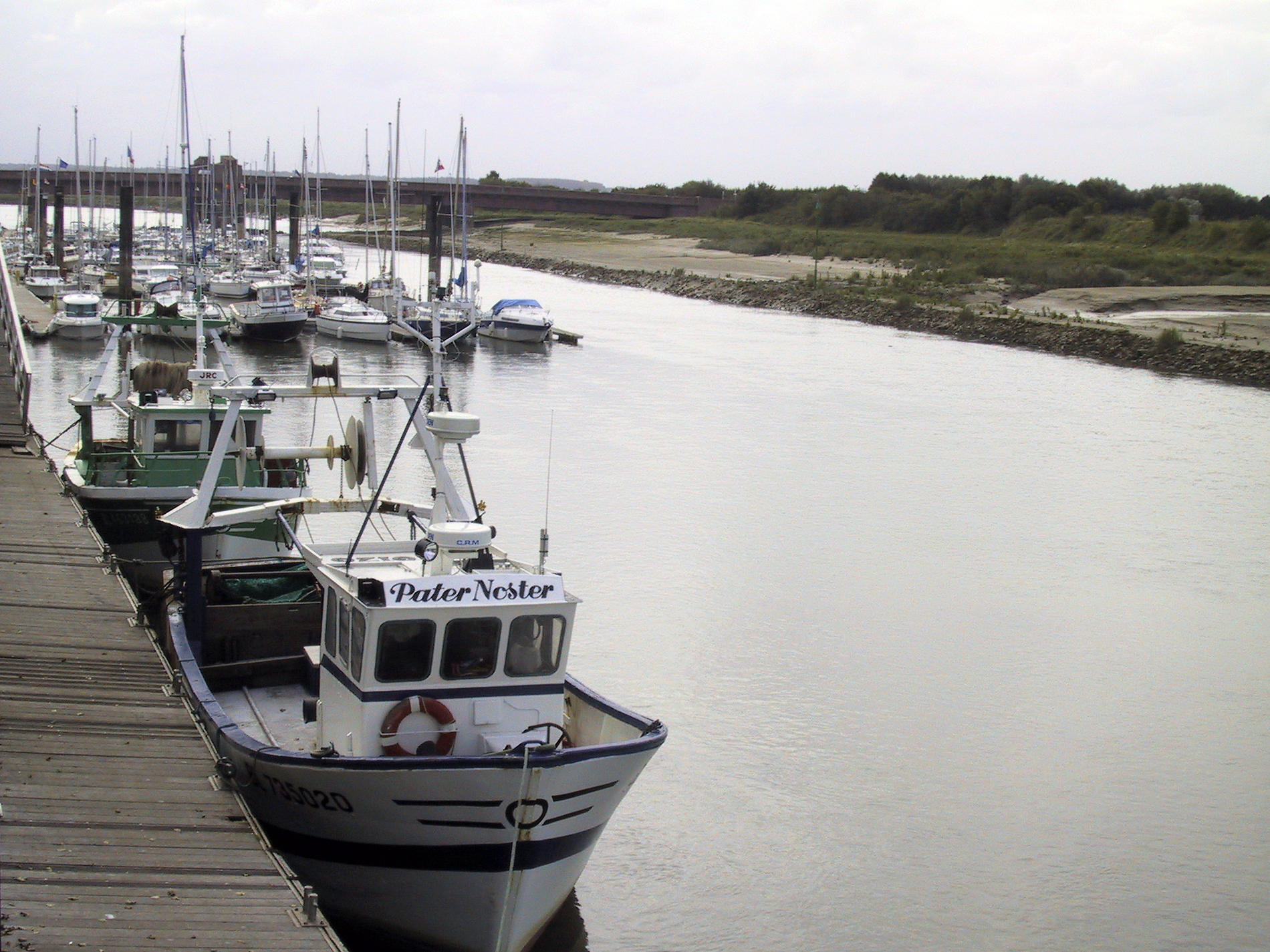 Le port d'Etaples, au fond de l'estuaire de la Canche